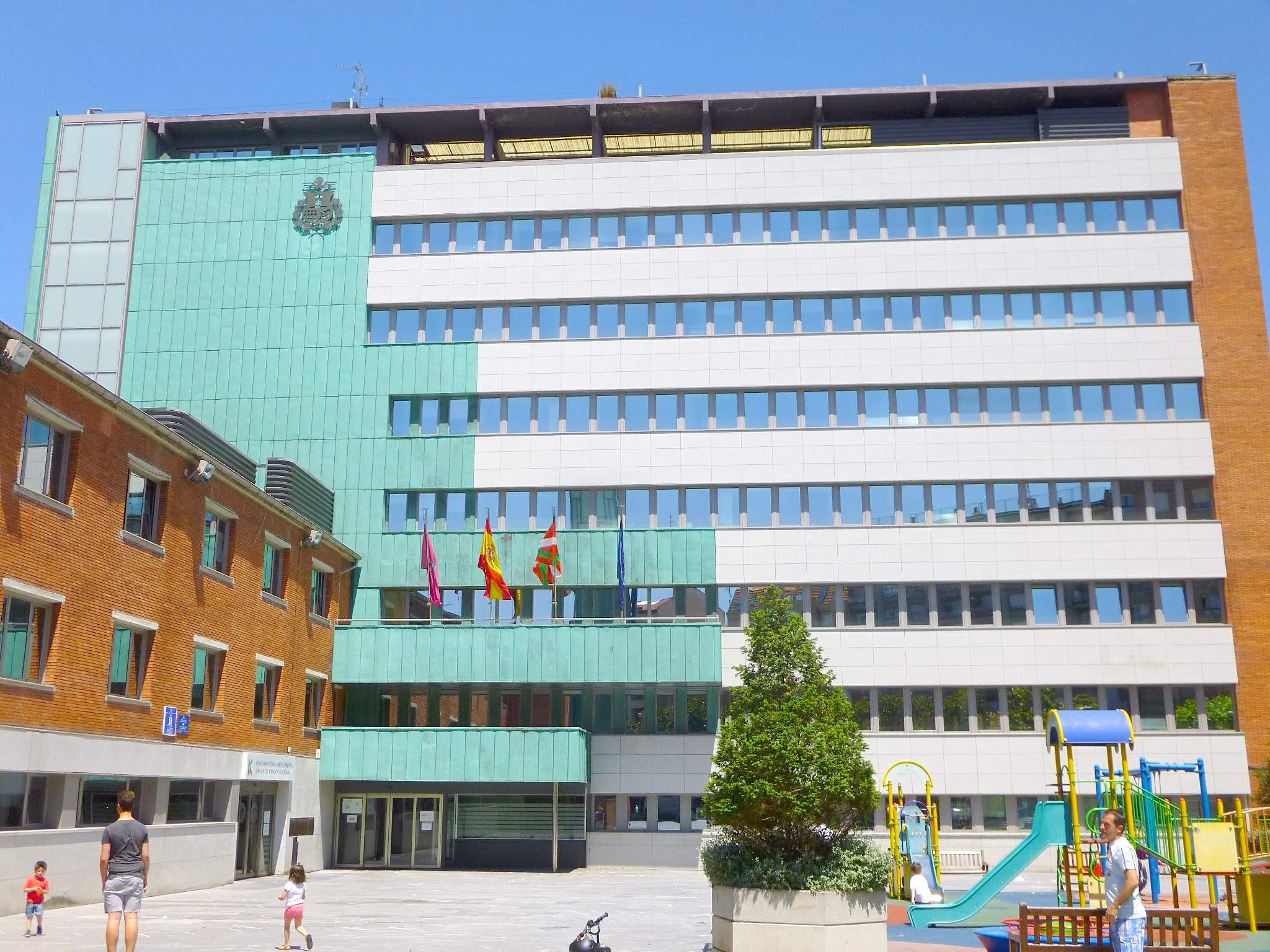 Ayuntamiento de Barakaldo (Bizkaia)